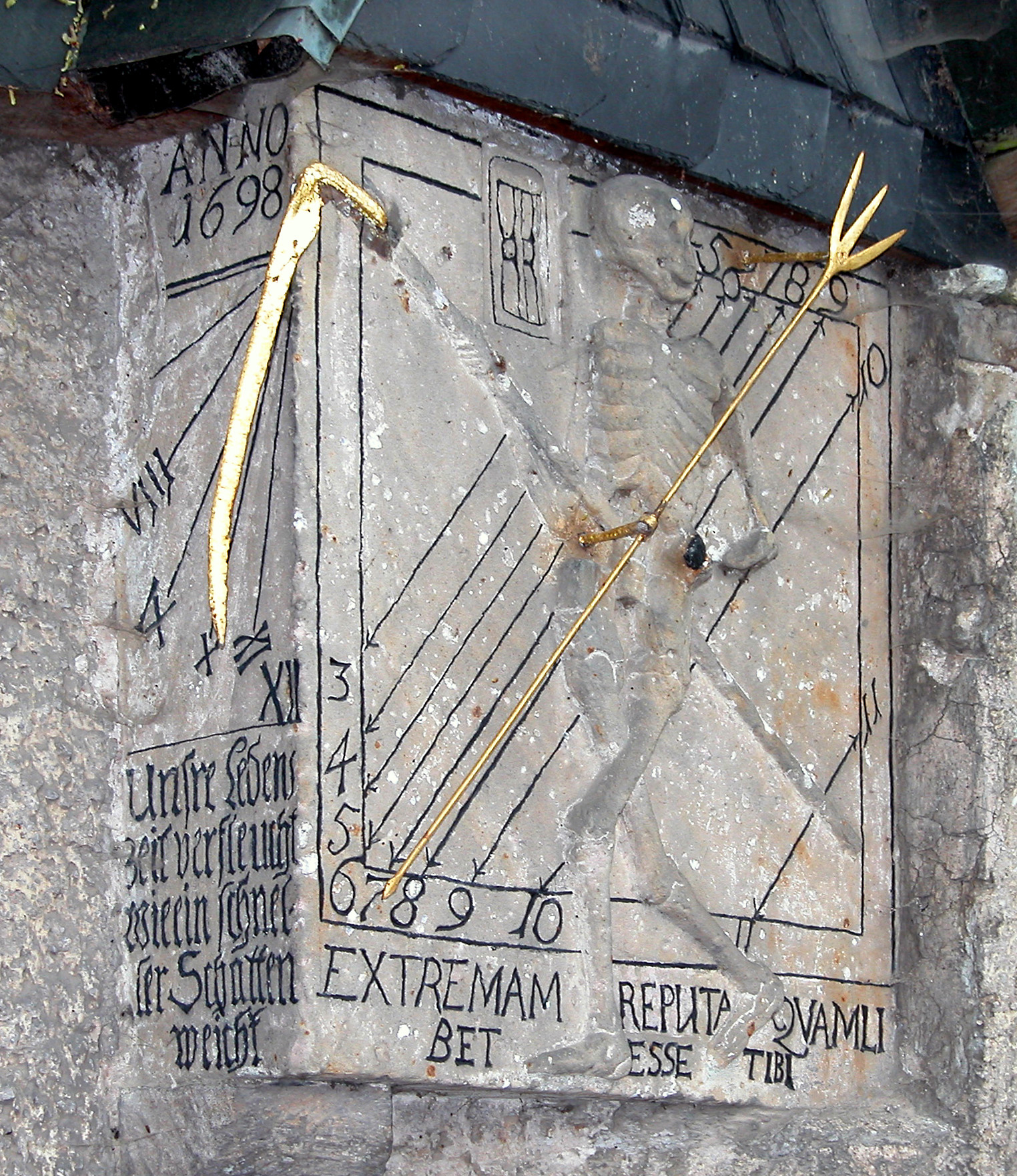 02.05.2004 06577 Gorsleben: Dorfplatz. Friedhofstor mit Sensenmann-Sonnenuhr "Tod von Gorsleben" (1698). [DSCN3142.JPG]20040502210DR.JPG(c)Blobelt